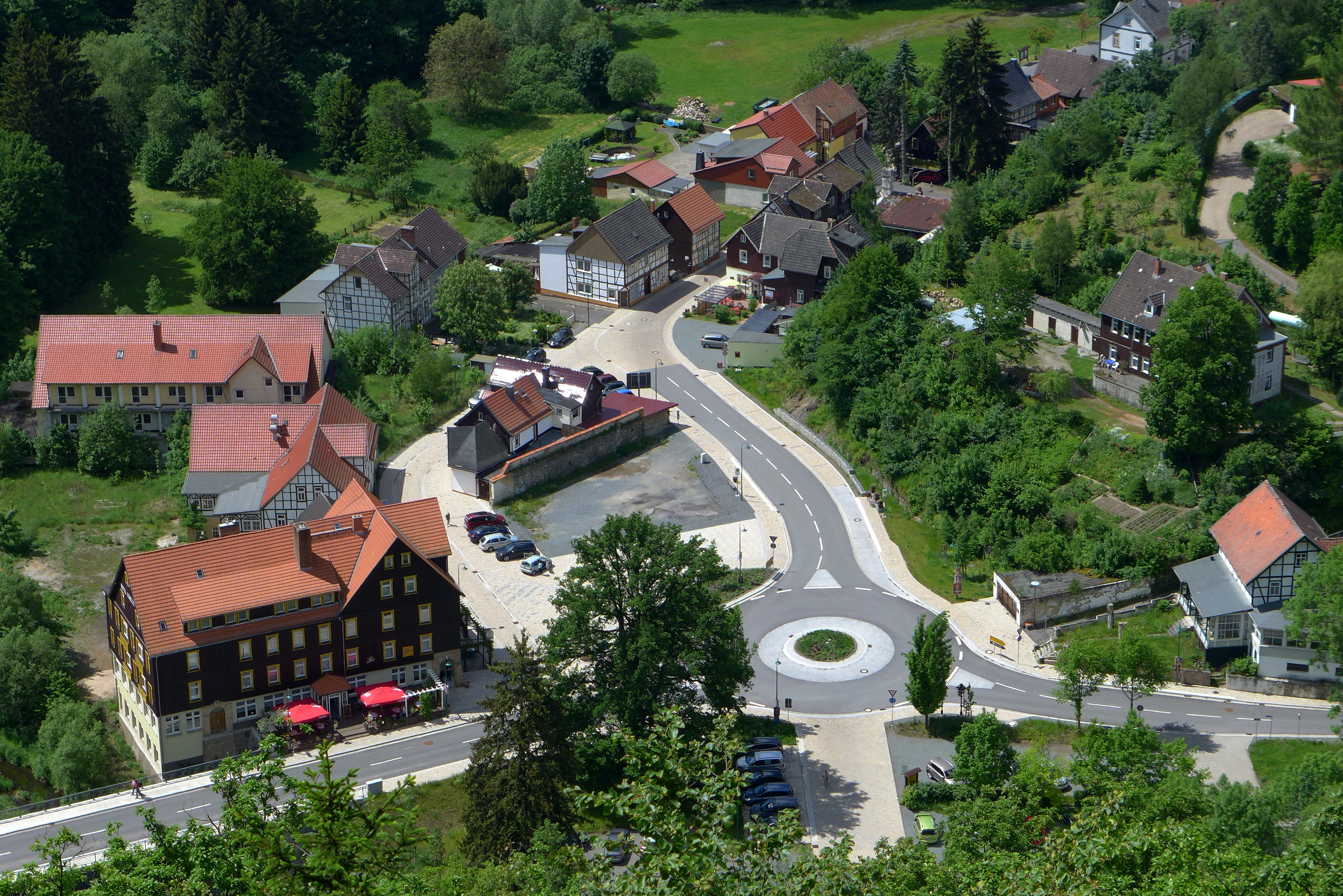 Blick vom Aussichtspunkt "Weißer Hirsch" auf Treseburg